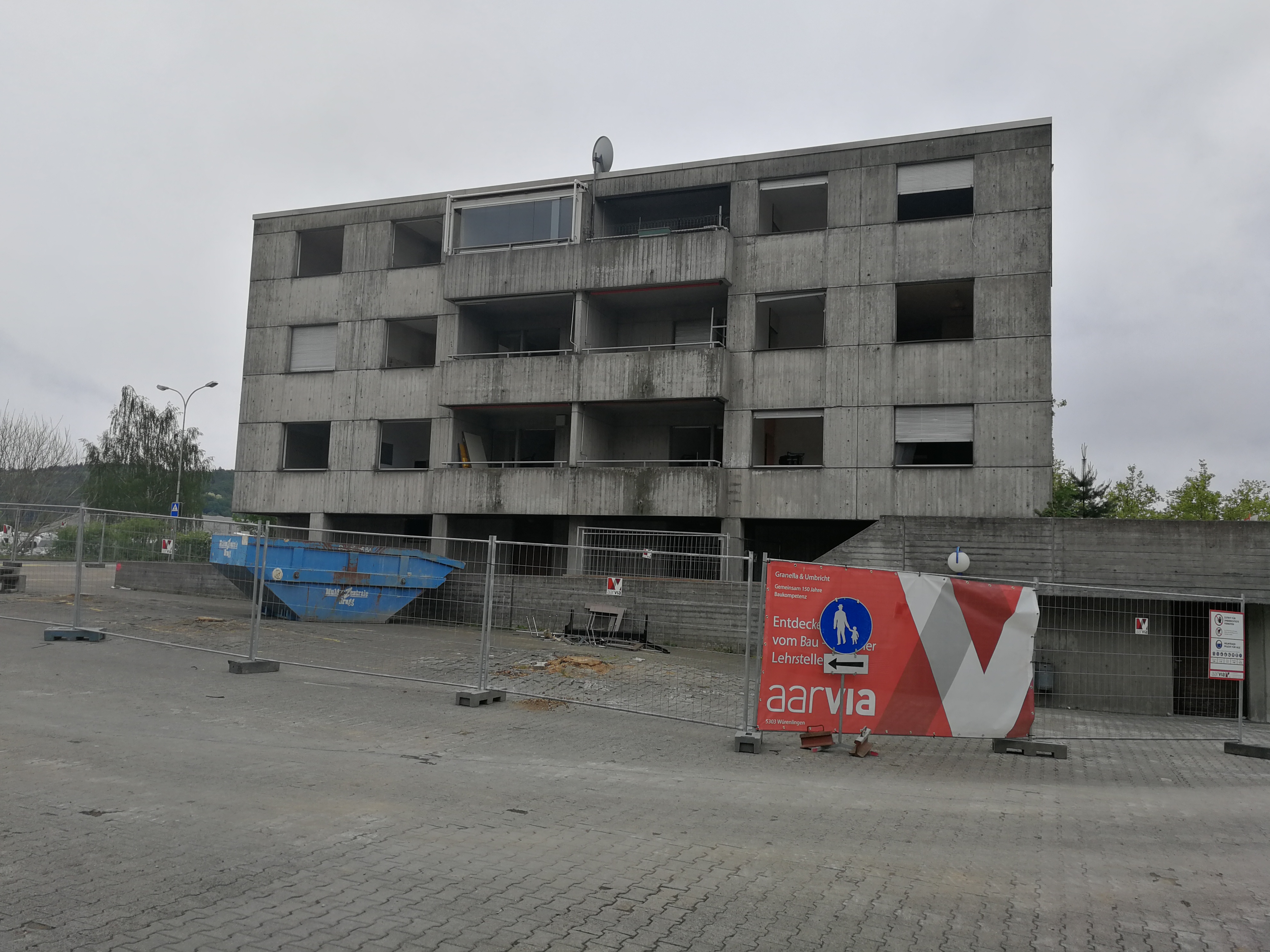 Das Personalhaus des Tägi kurz vor dem Abriss bei der Sanierung 2018